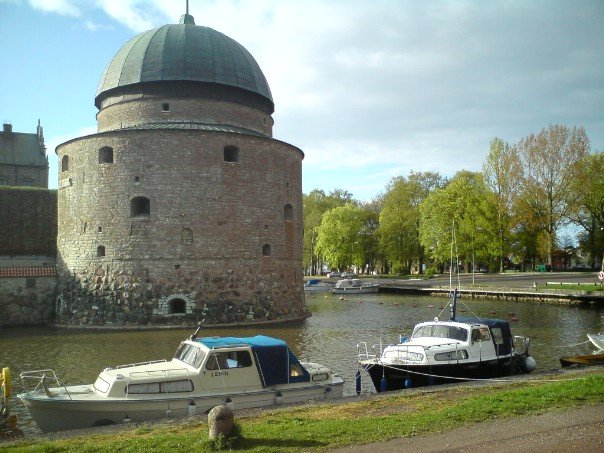 Vallgraven och gästhamnen vid Vadstena slott 2009